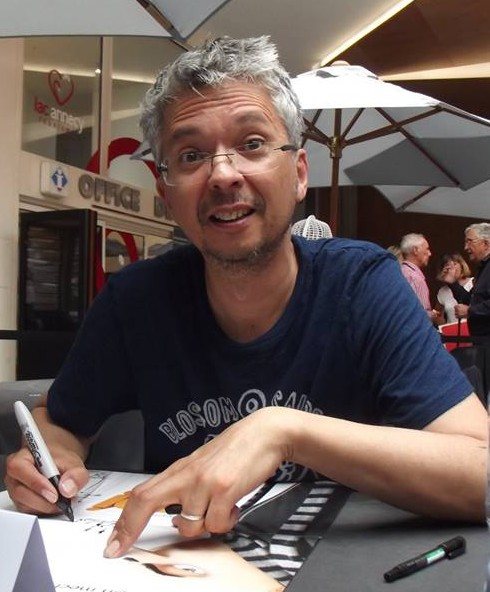 Pierre Coffin au festival international du film d'animation d'Annecy 2017